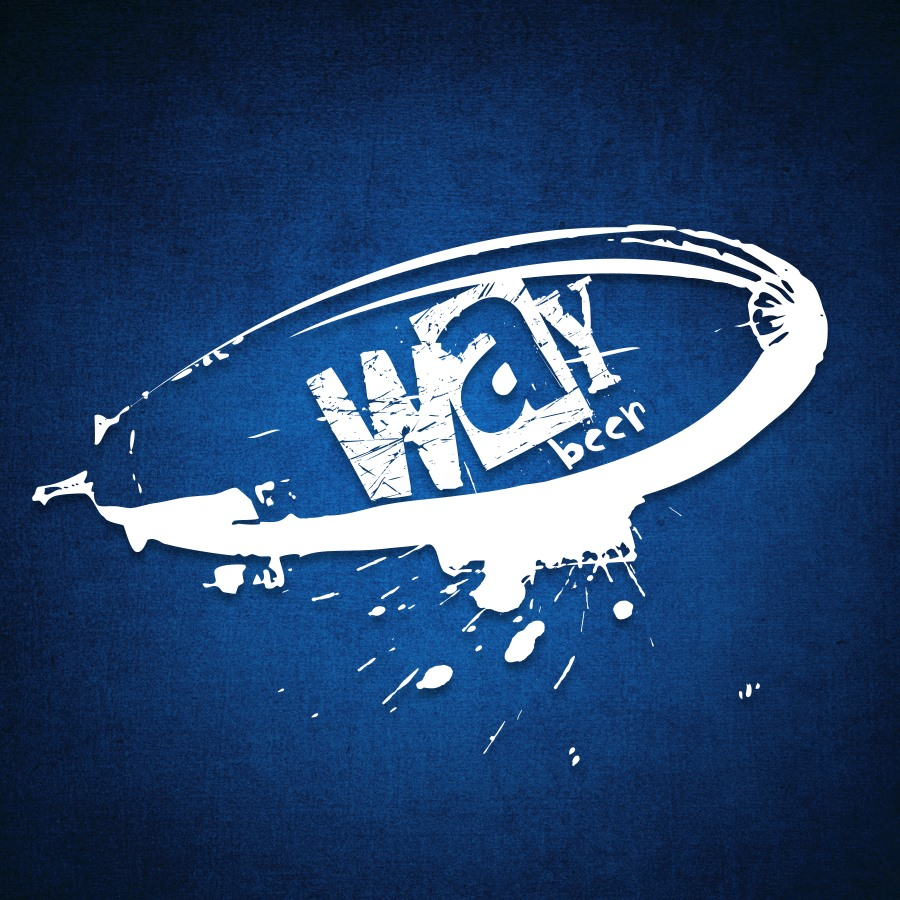 Logo cervejaria Way Beer